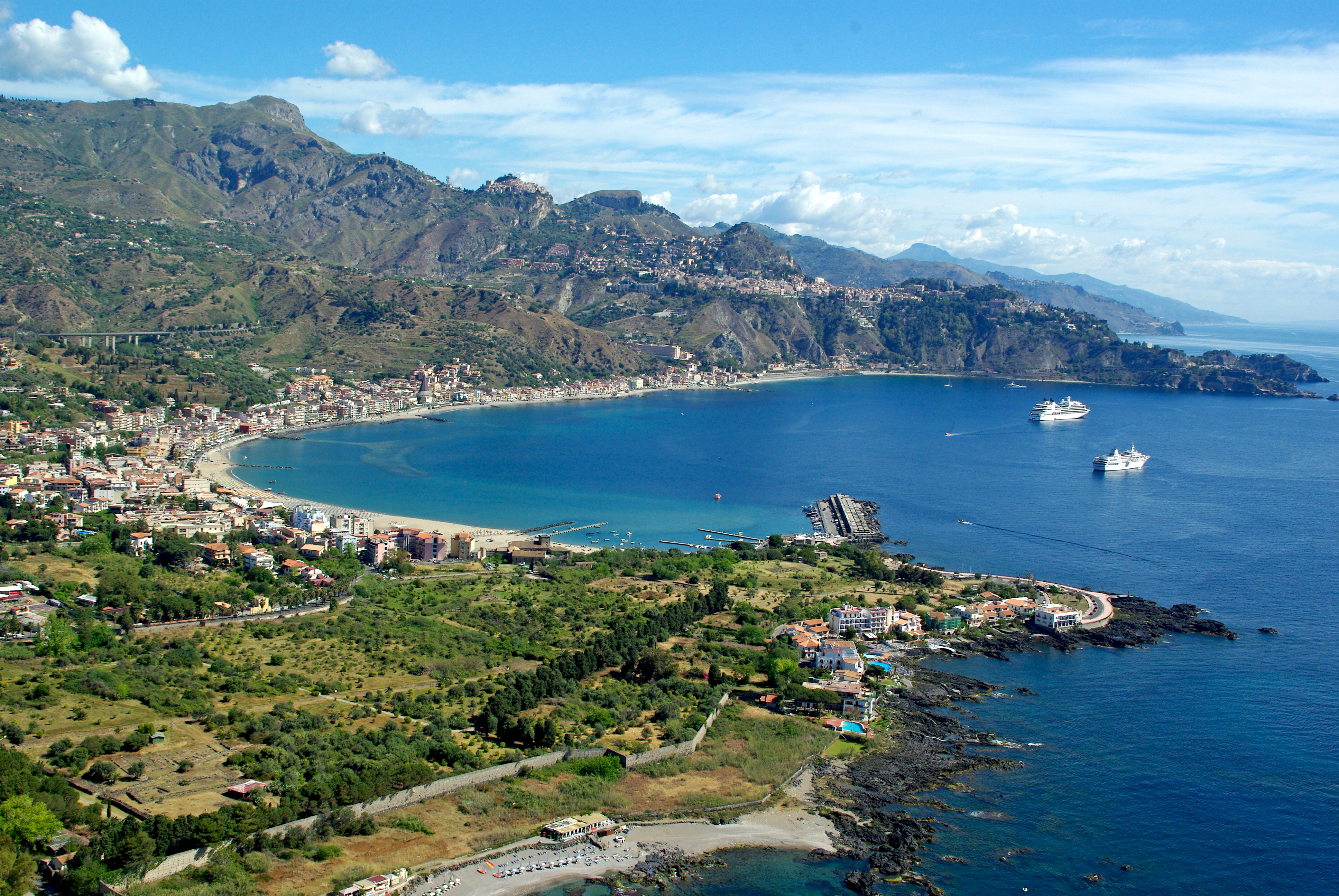 Baia di Taormina - Sicily